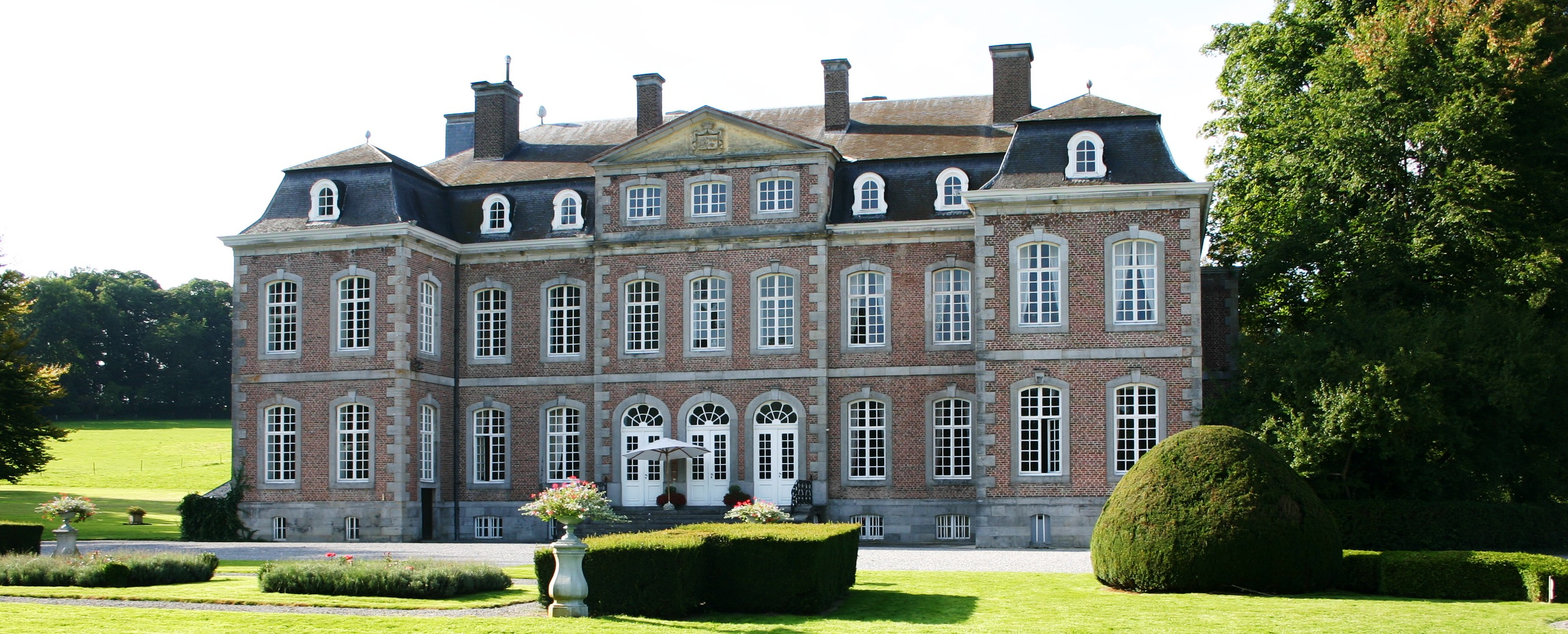 Viischt Fass vum Schlass vu Bervaux.